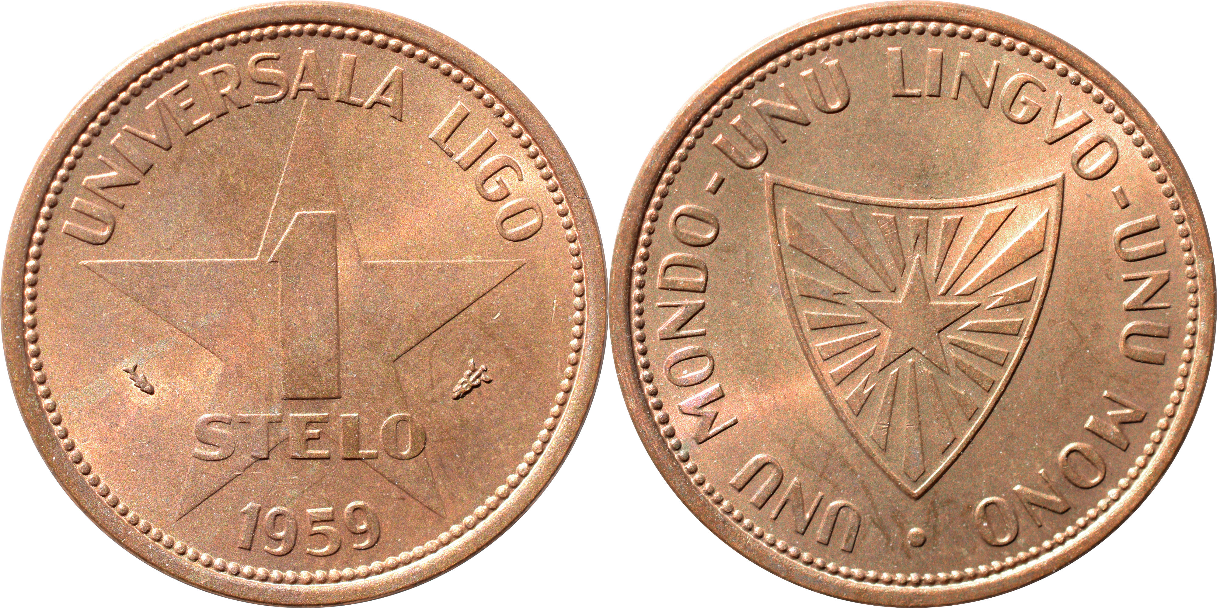 Monero de 1 stelo.